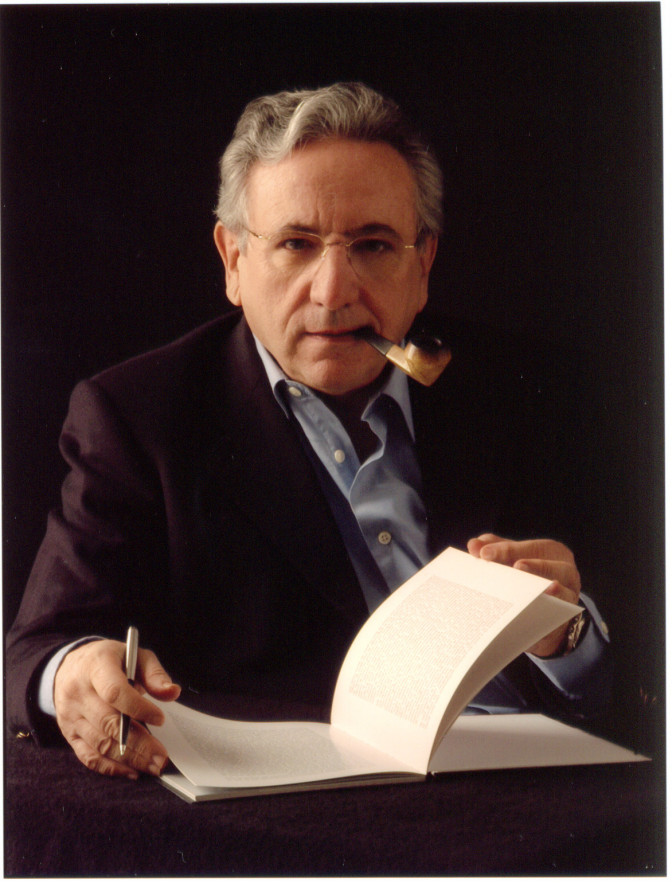 El poeta y novelista Pedro Miguel Lamet, SJ.